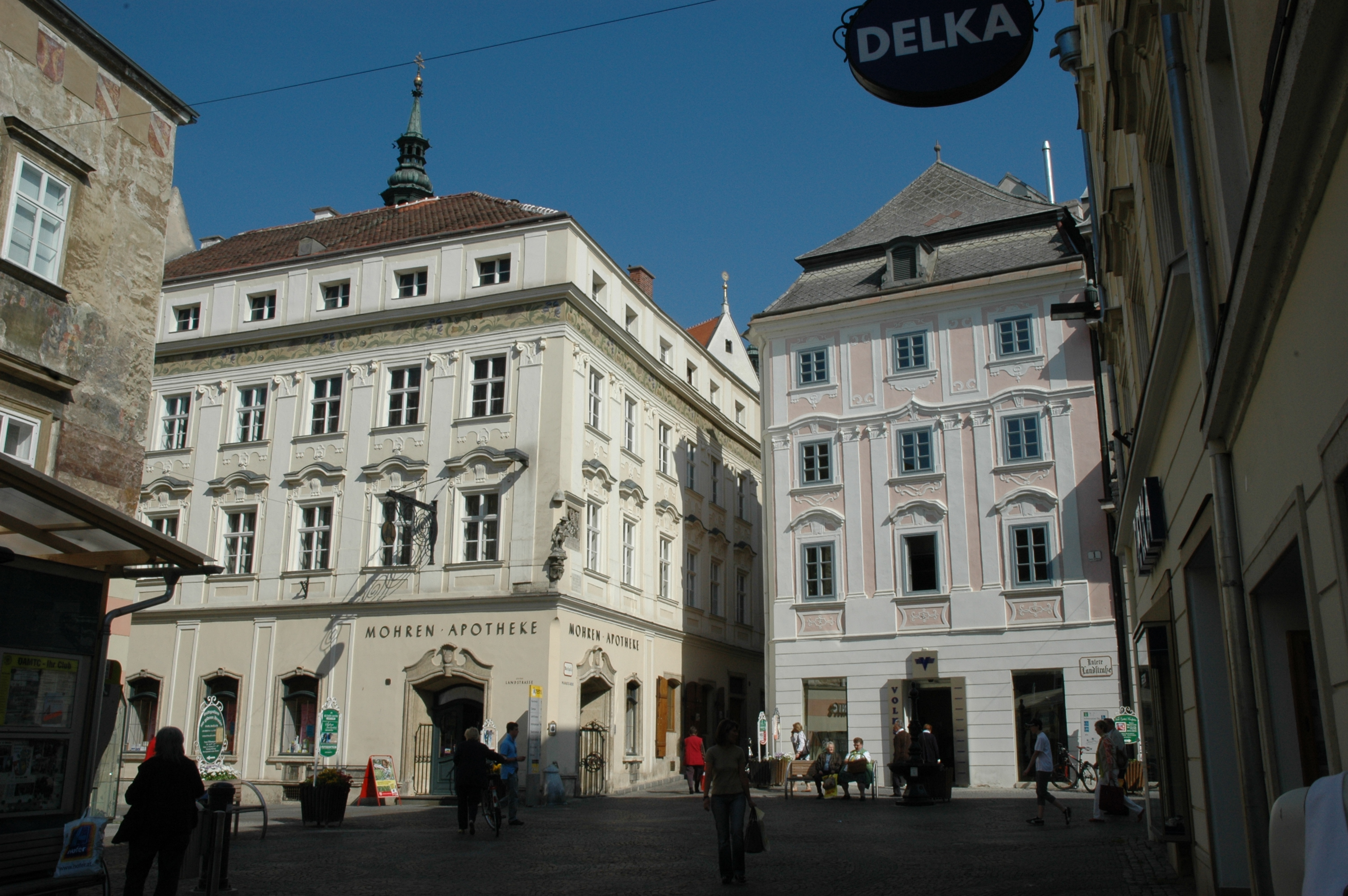 Mohrenapotheke Krems